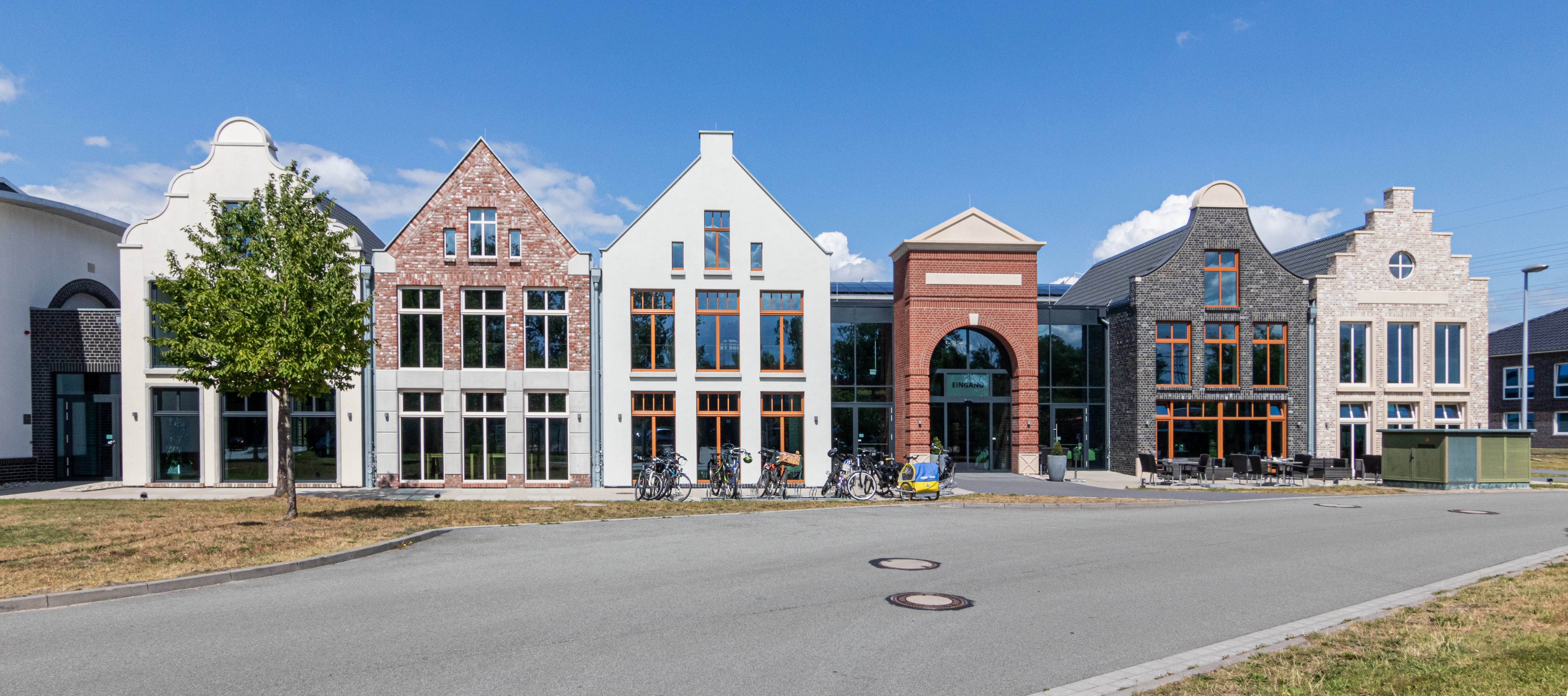 Eingansbereich des Leeraner Miniaturland